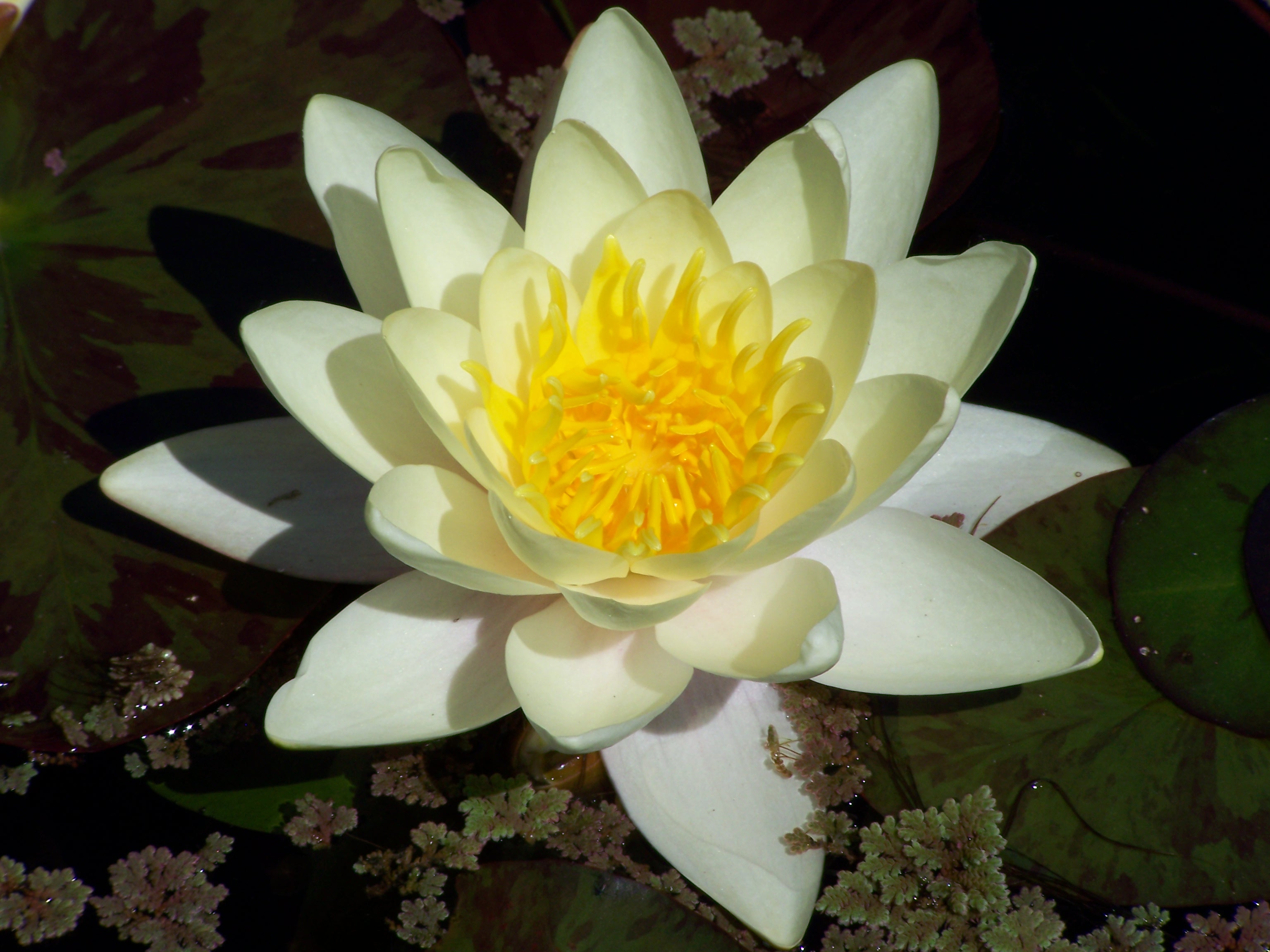 Seerose im Botantischen Garten Erlangen oder im Schlossgarten Erlangen.